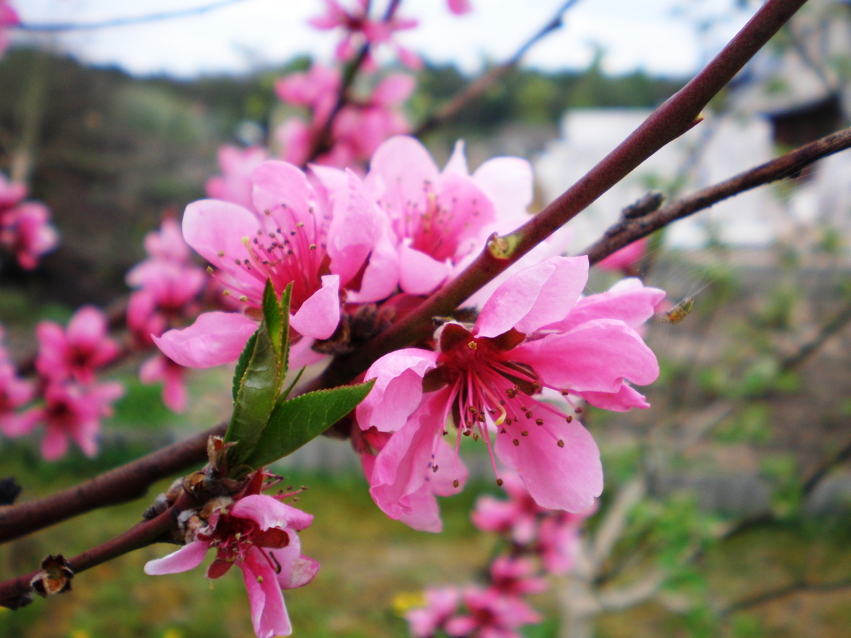 Prunus persica